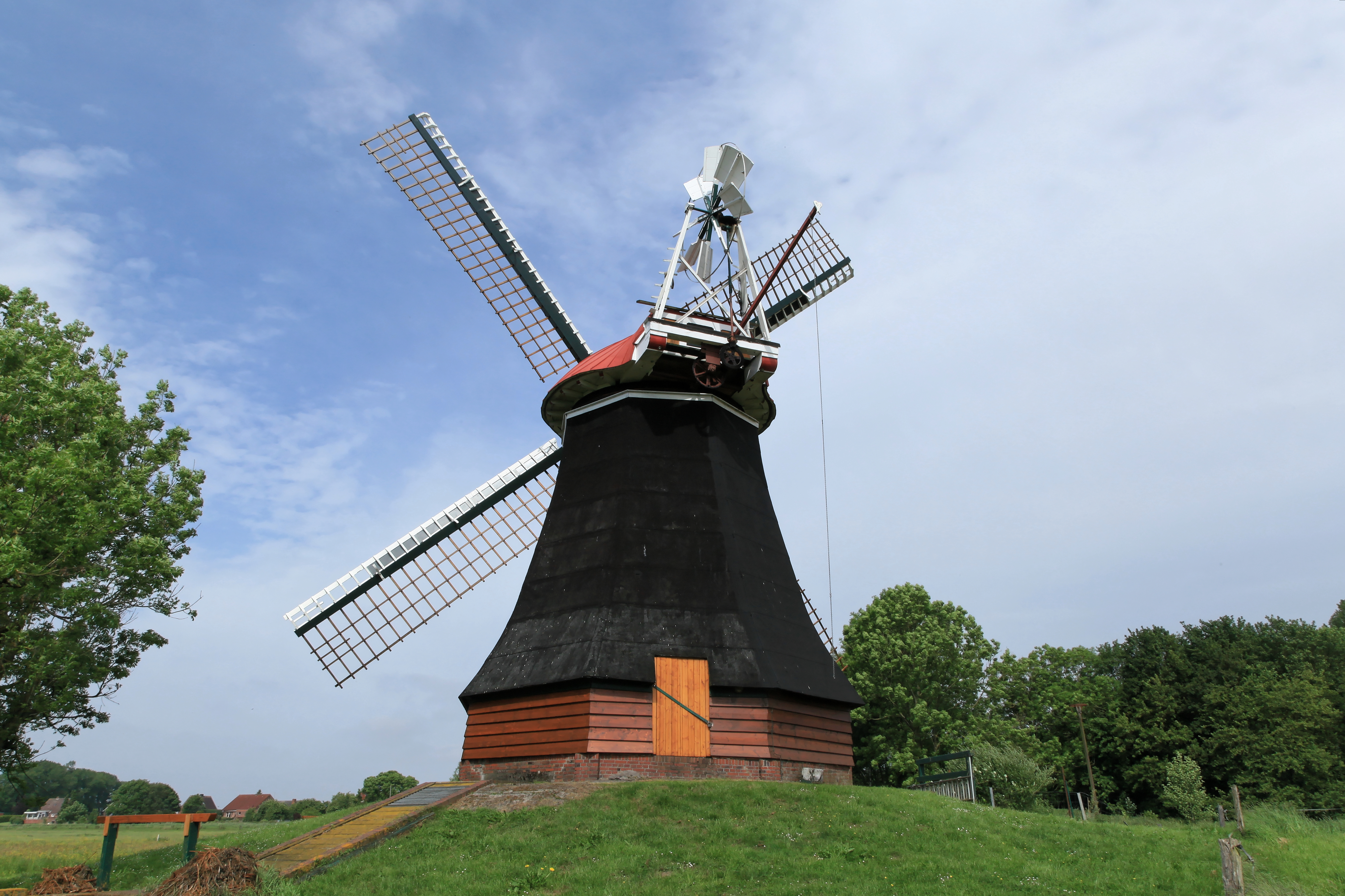 Wasserschöpfmühle Wynhamster Kolk, Wynhamster Kolk in Bunde (Germany)